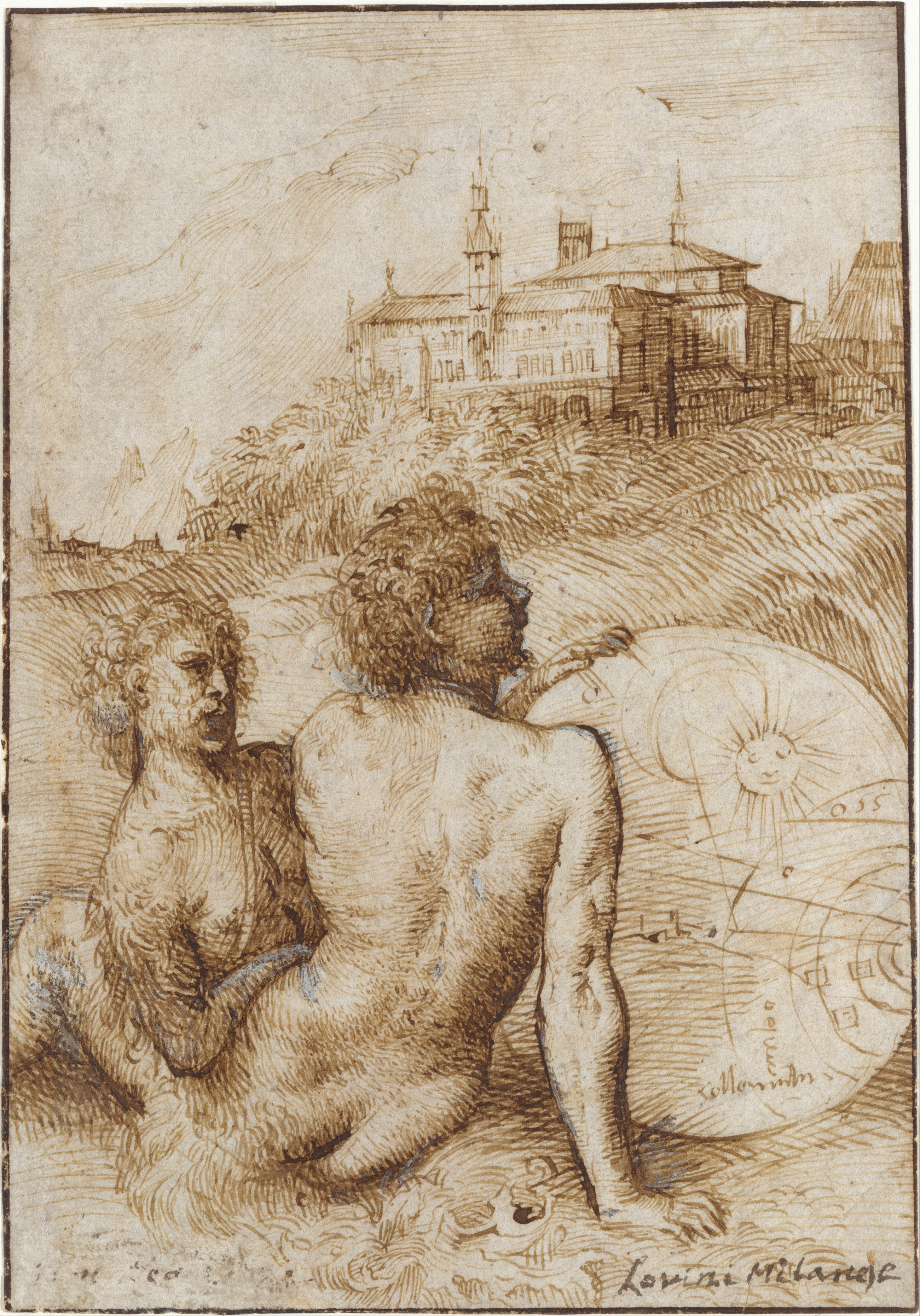 Drawing; Drawings